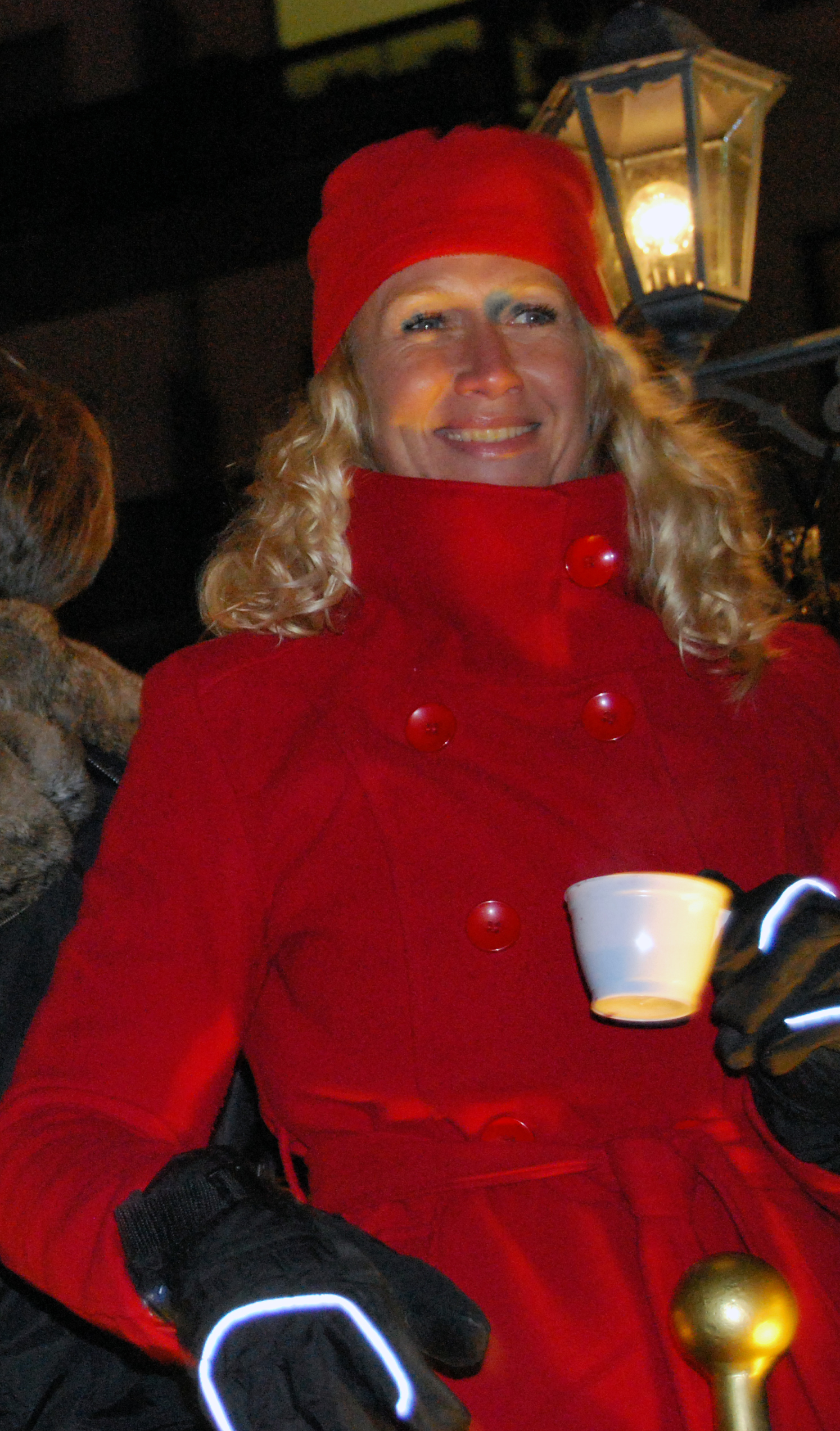 Ann de batselier tijdens VTM-kerstparade in Genk, 2008